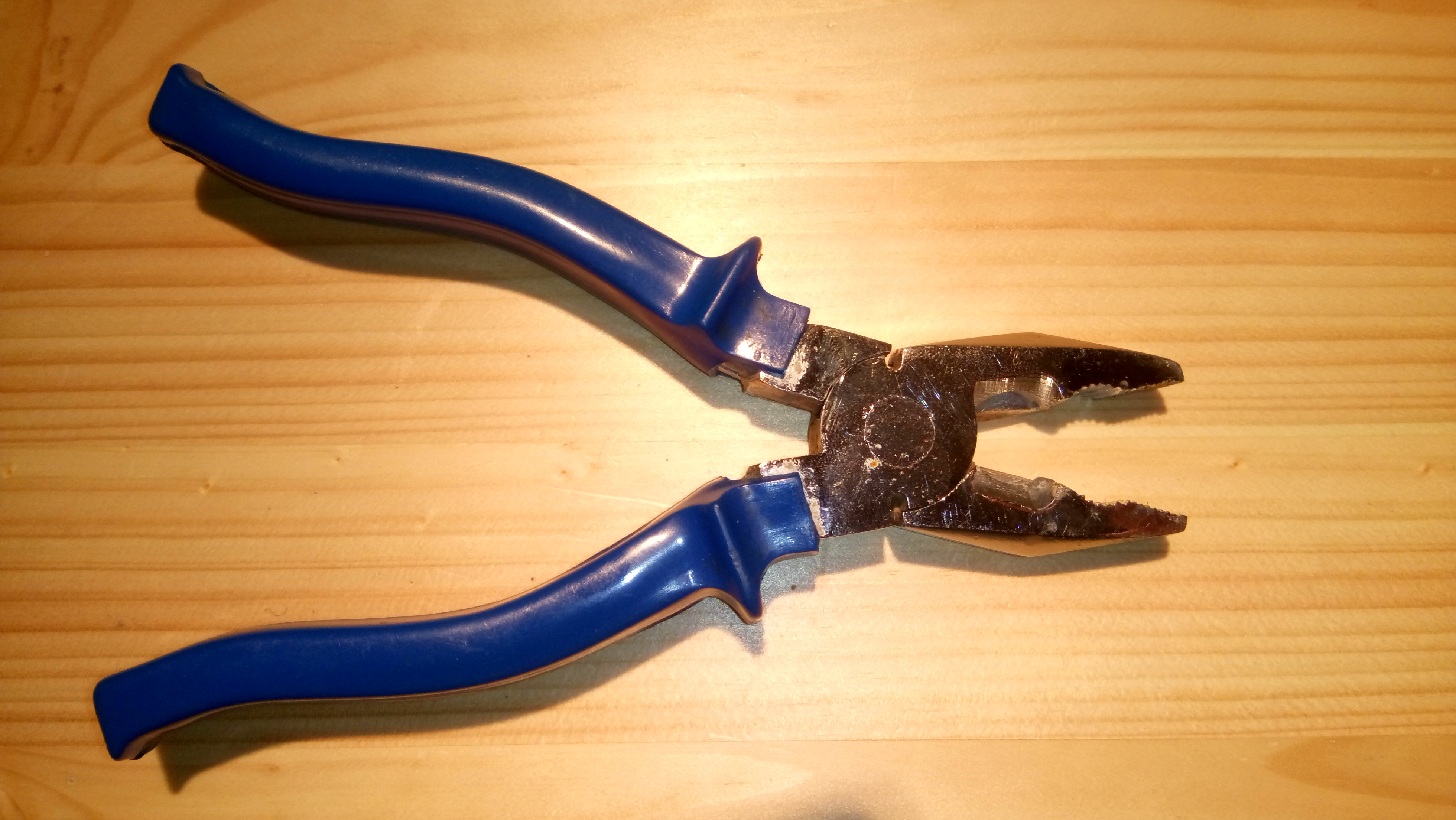 Näpitsad on kangmehhanismi üks lihtsamaid näiteid.